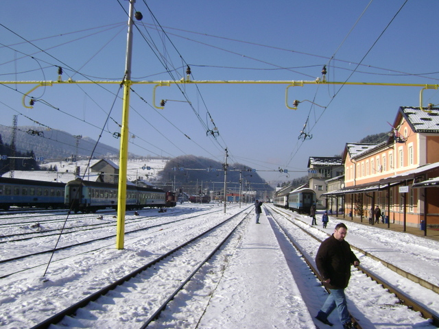 Kolodvor Moravice